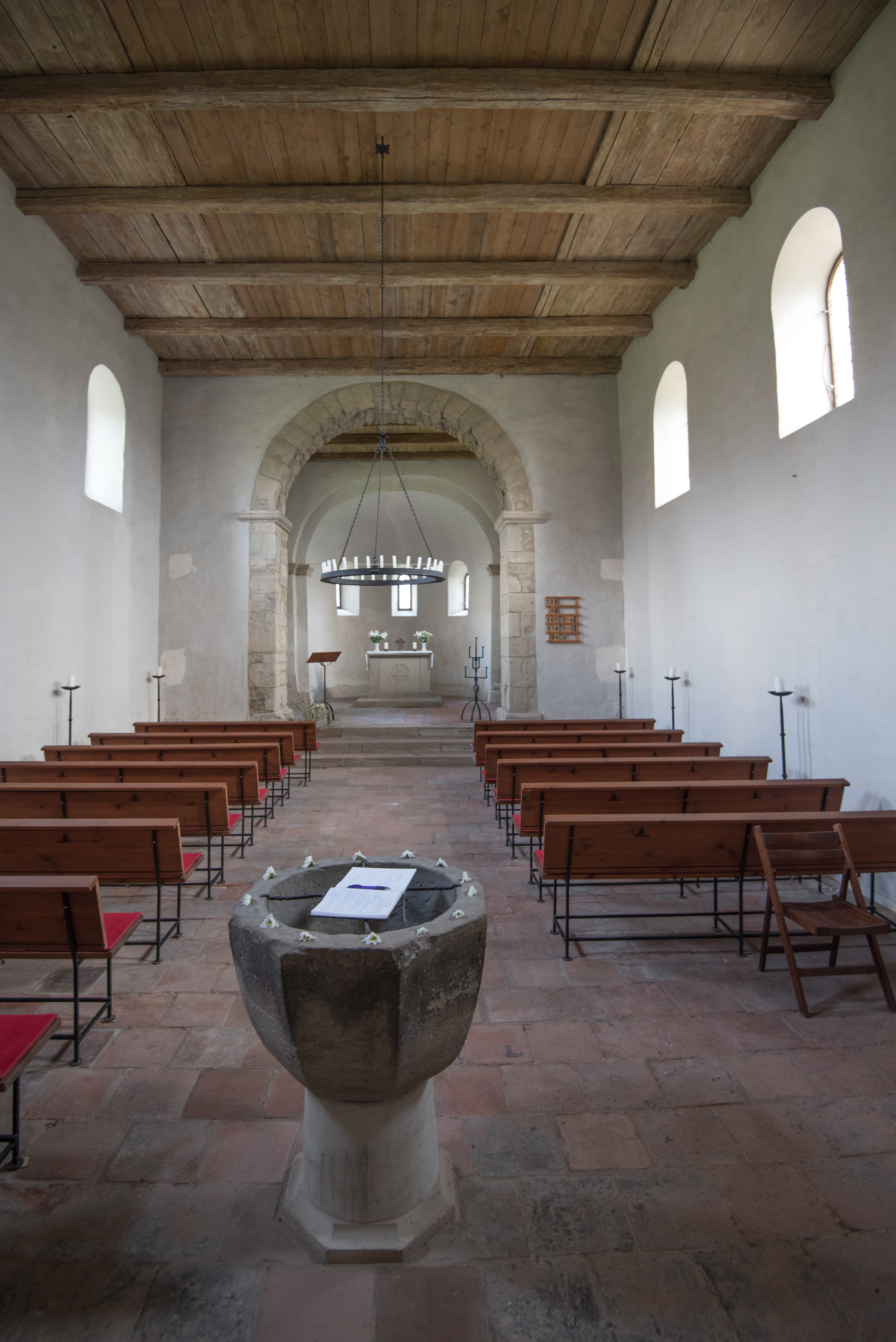 Bernburg, Weinberg, St. Stephanus